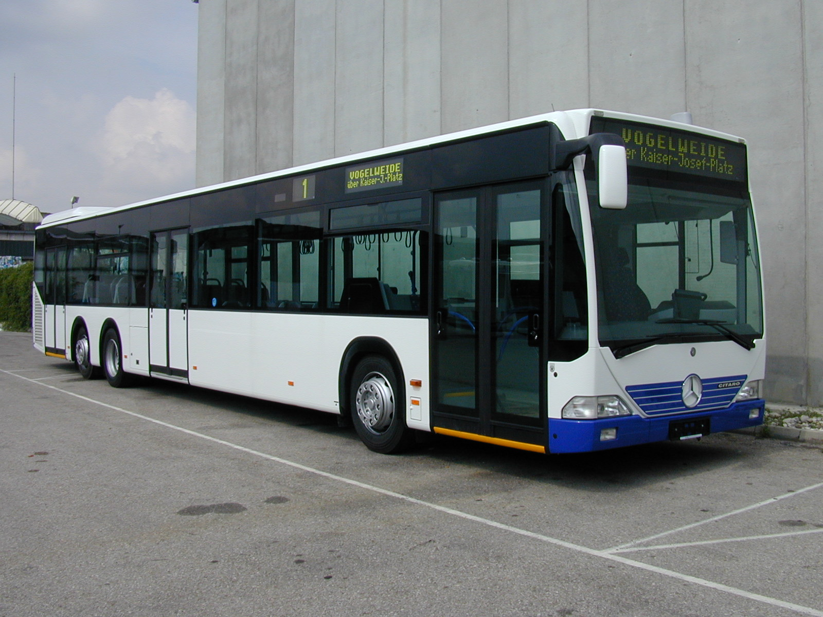 2001 gekaufte Linienbus Mercedes Citaro O 530 N3-L